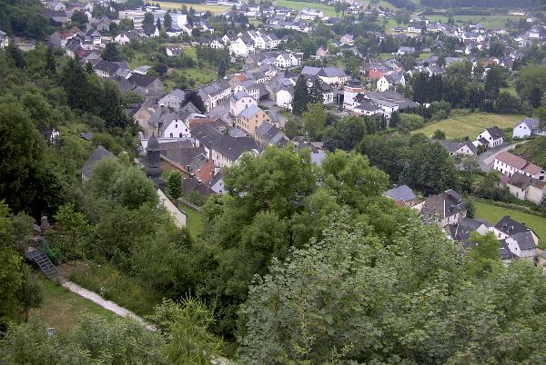 Blick von der Burg auf den Ort Schönecken im August 2003